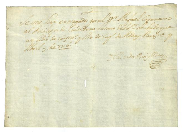 Rebut d'entrega del títol de Ciutadà Honrat de Rafael Casanova a Salvador Prats i Matas el 1716